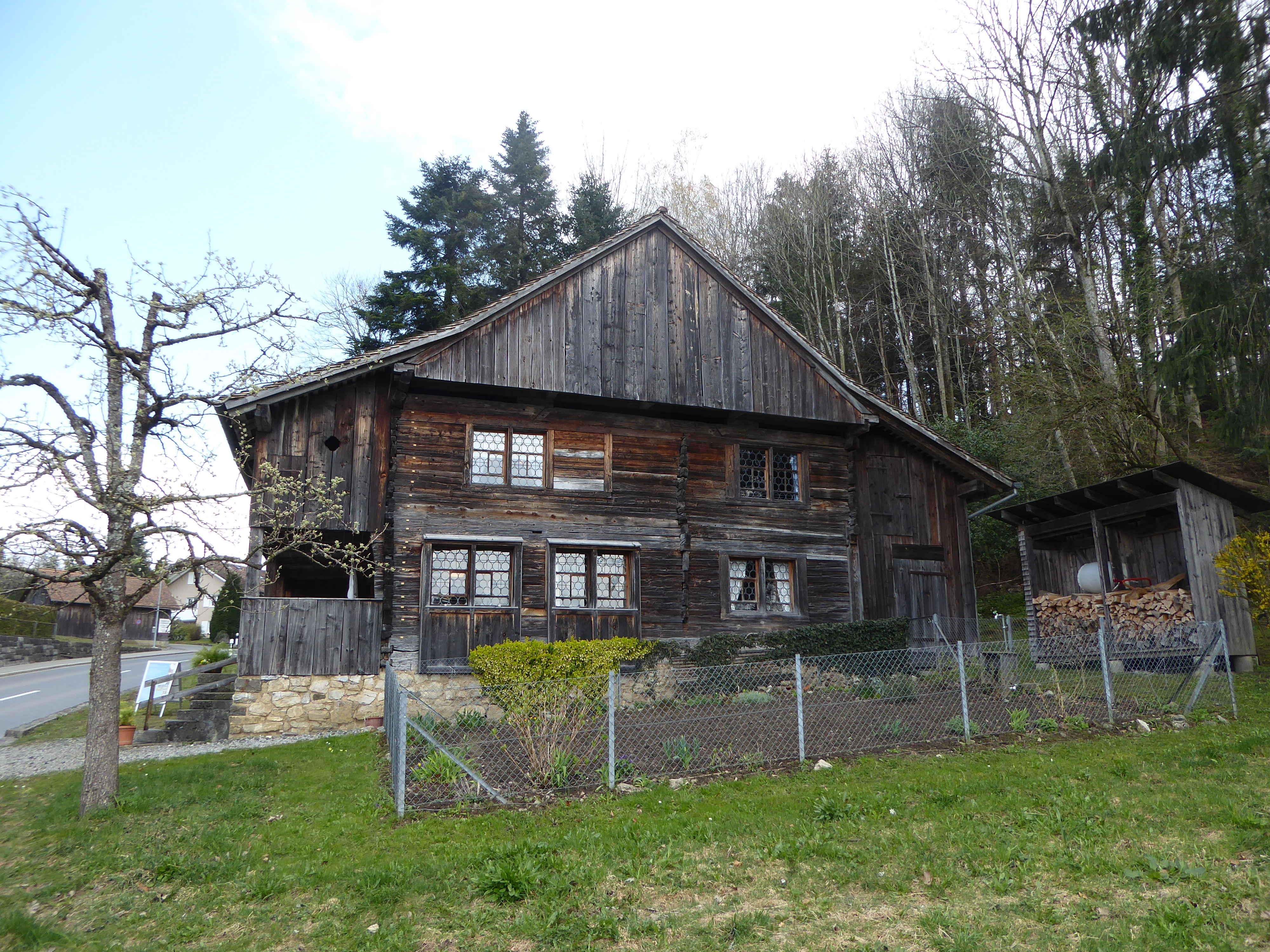 Biedermann-Haus Schellenberg: Hauptfassade